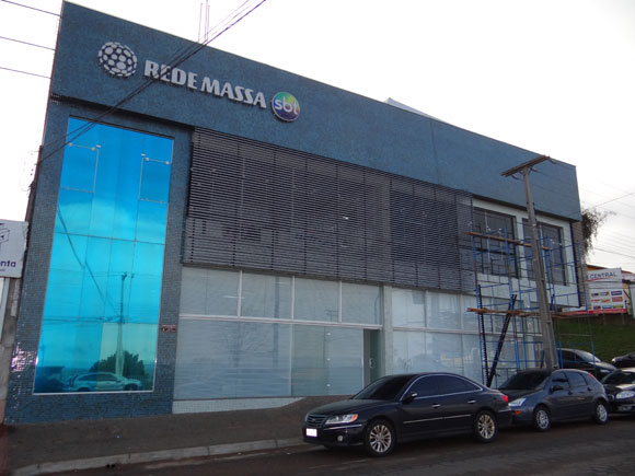 Sede Tv Guará Rede Massa